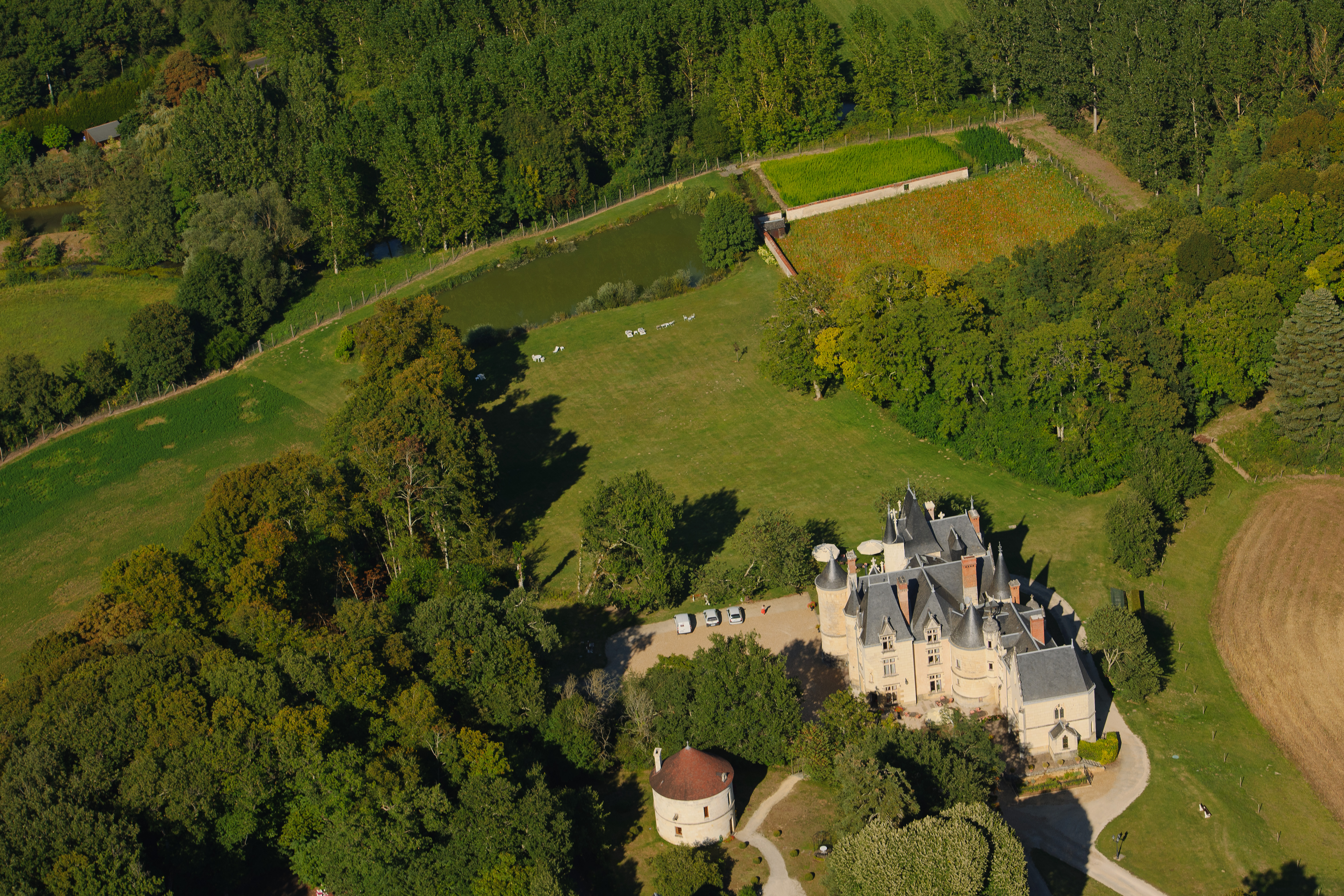 Le Château de Brou 37800 Noyant-de-Touraine